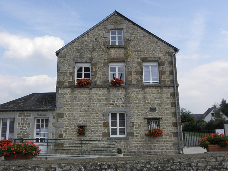 Mairie de Céaux (50).